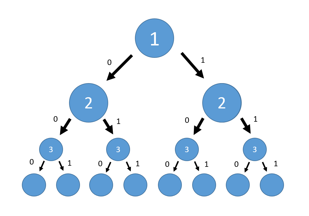 Дерево вариантов укладки 3 предметов в рюкзак